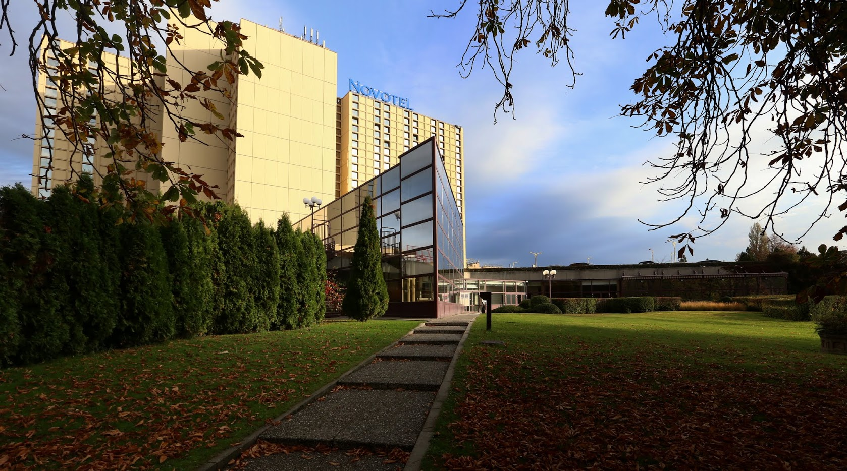 Novotel. Budapest